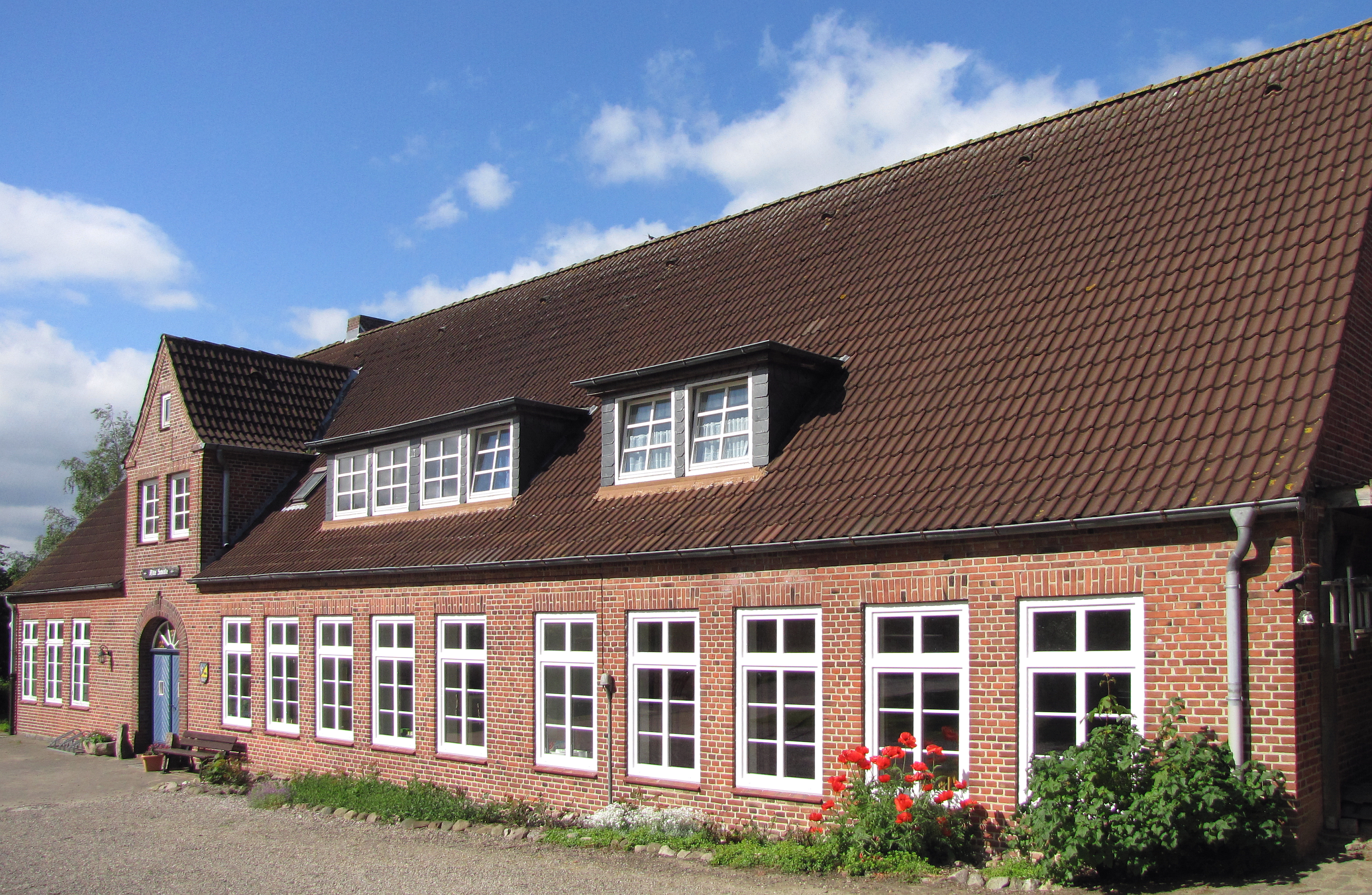 alte Schule in Norgaardholz OT von Steinberg Ostsee Foto 2012 Wolfgang Pehlemann IMG_7390